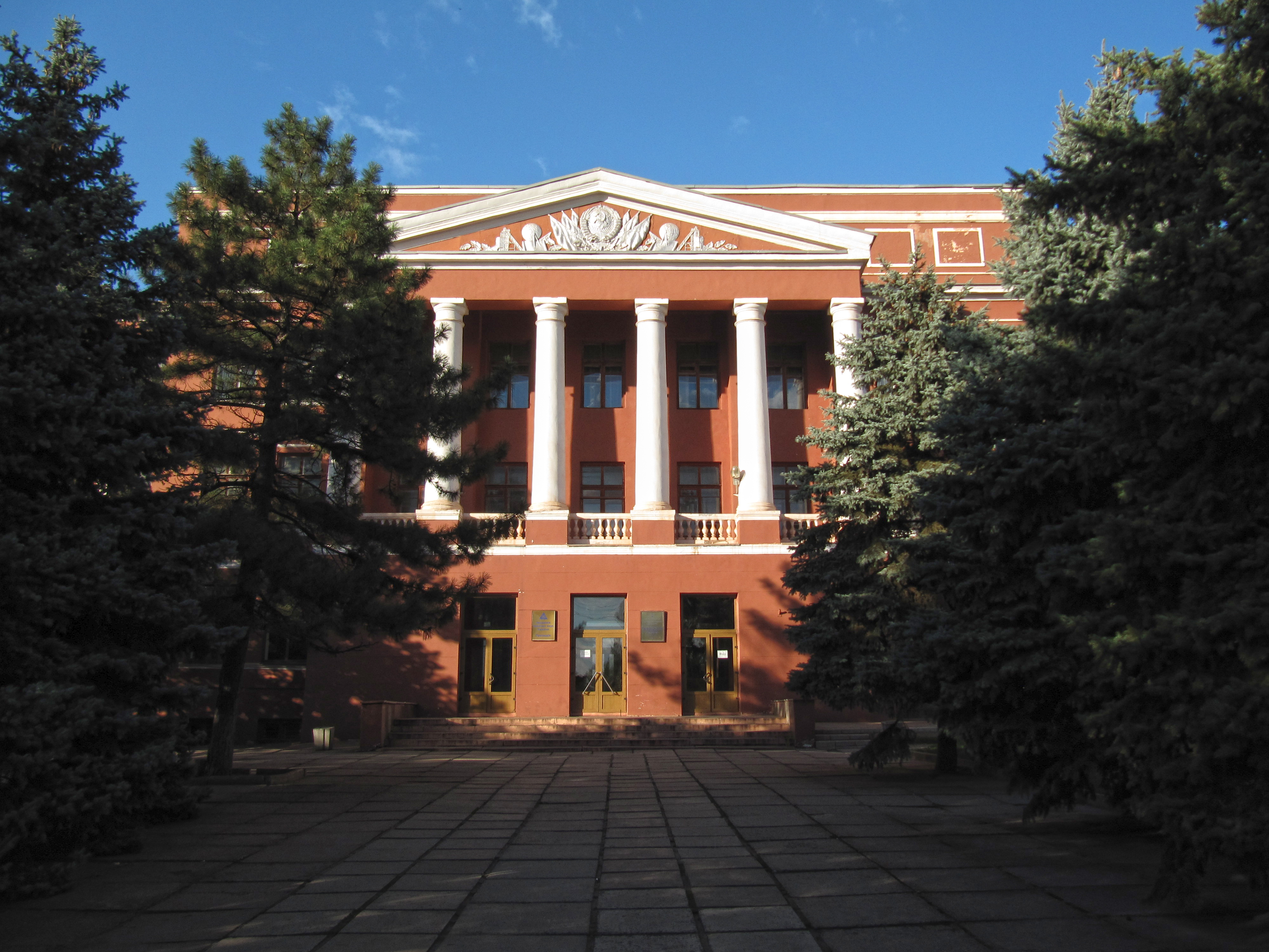 Гірничорудний інститут, головний корпус.